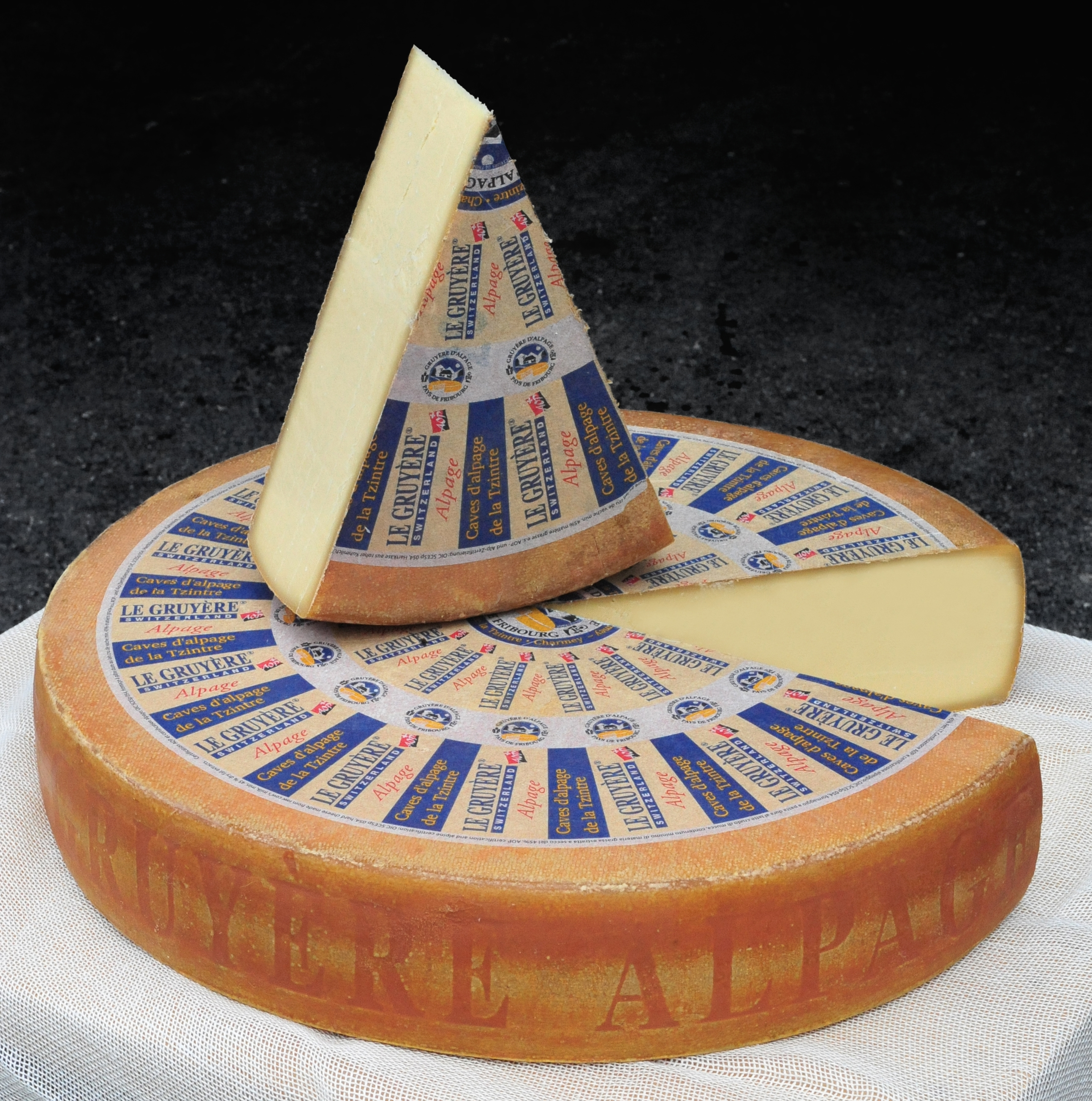 Gruyère d'alpage N°6062 à La Tzintre, Val-de-Charmey dans le canon de Fribourg (Suisse).